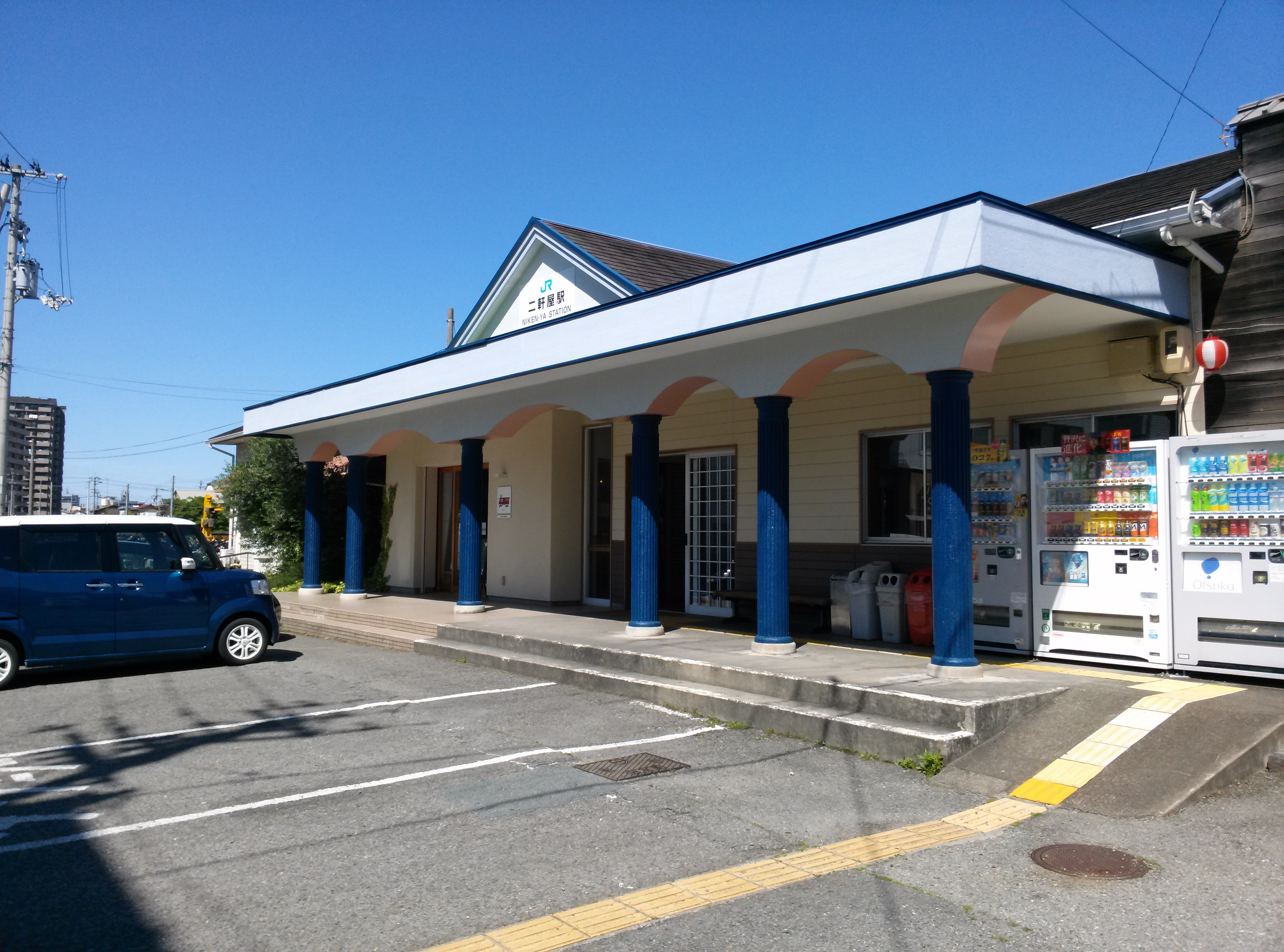 二軒屋駅舎